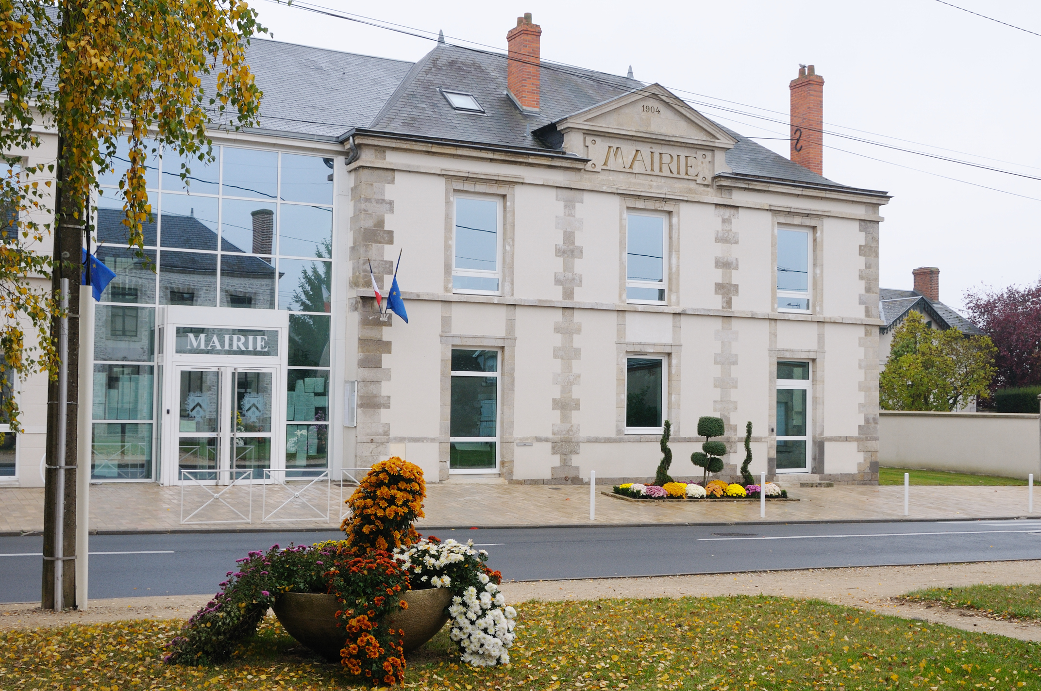 Mairie de Traînou, Loiret, France